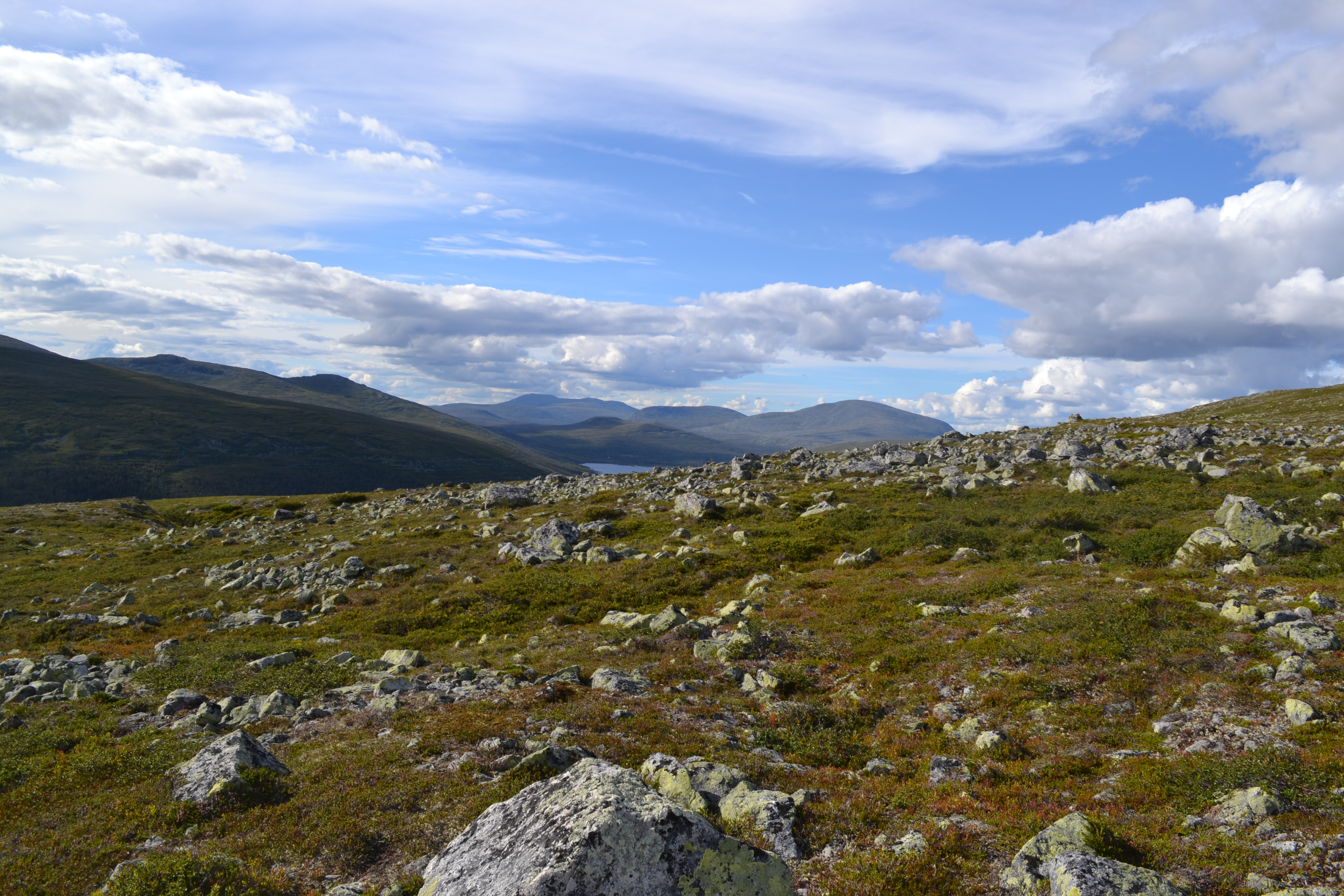 Bild på fjällen Vid Grövelsjön